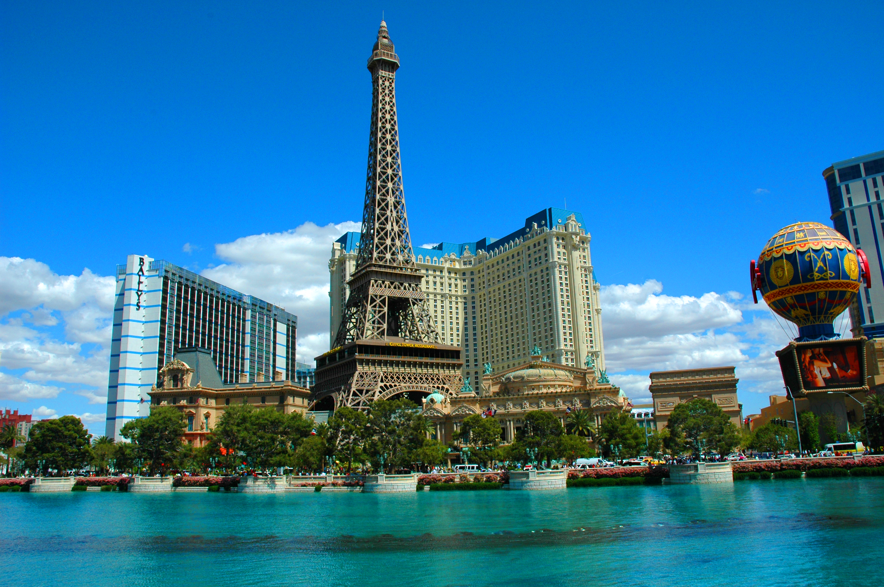 La Torre Eiffel ubicada en Las Vegas (Nevada)